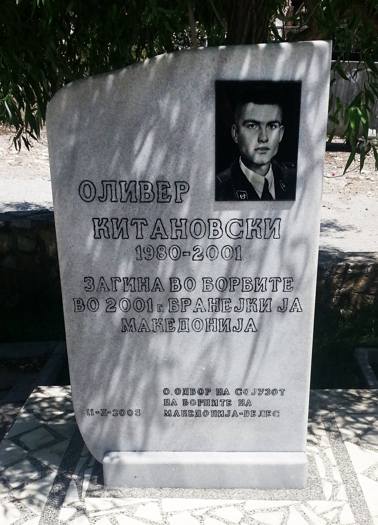 Споменик на бранителот Оливер Китановски во родното Башино Село, припадник на ЕСЗ Тигар, загинат во битката за Арачиново.